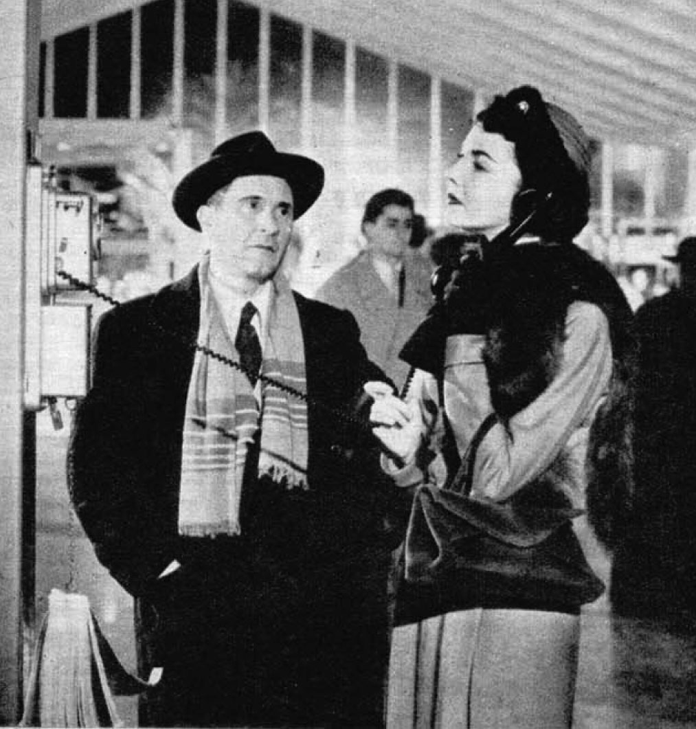 J.Jones e P.Stoppa_staz.Termini (De Sica 1953)